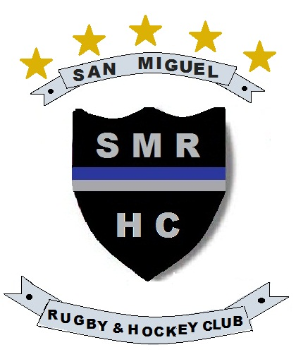 logo actualizado con las cinco estrellas